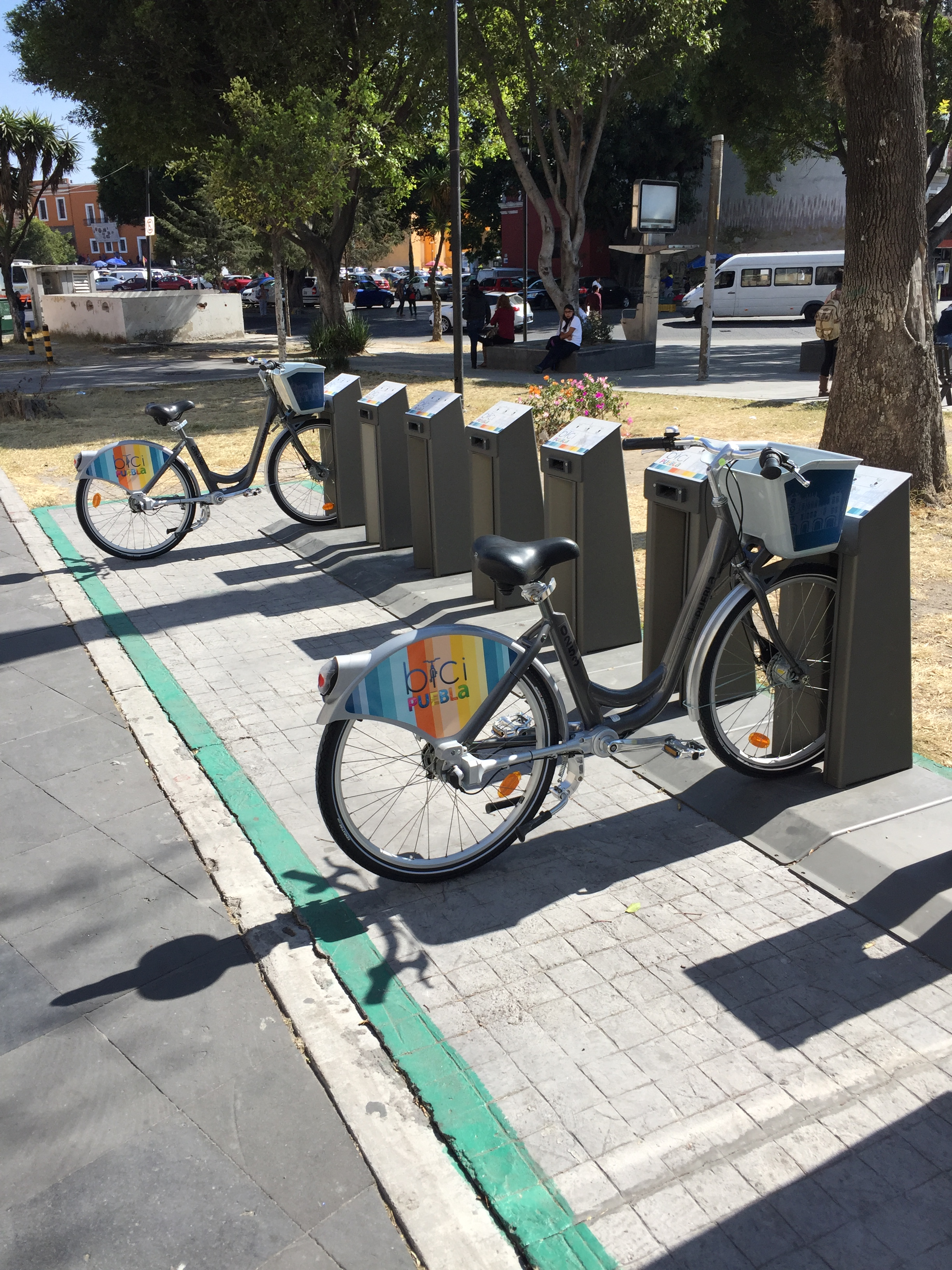 ciclo estación Puebla